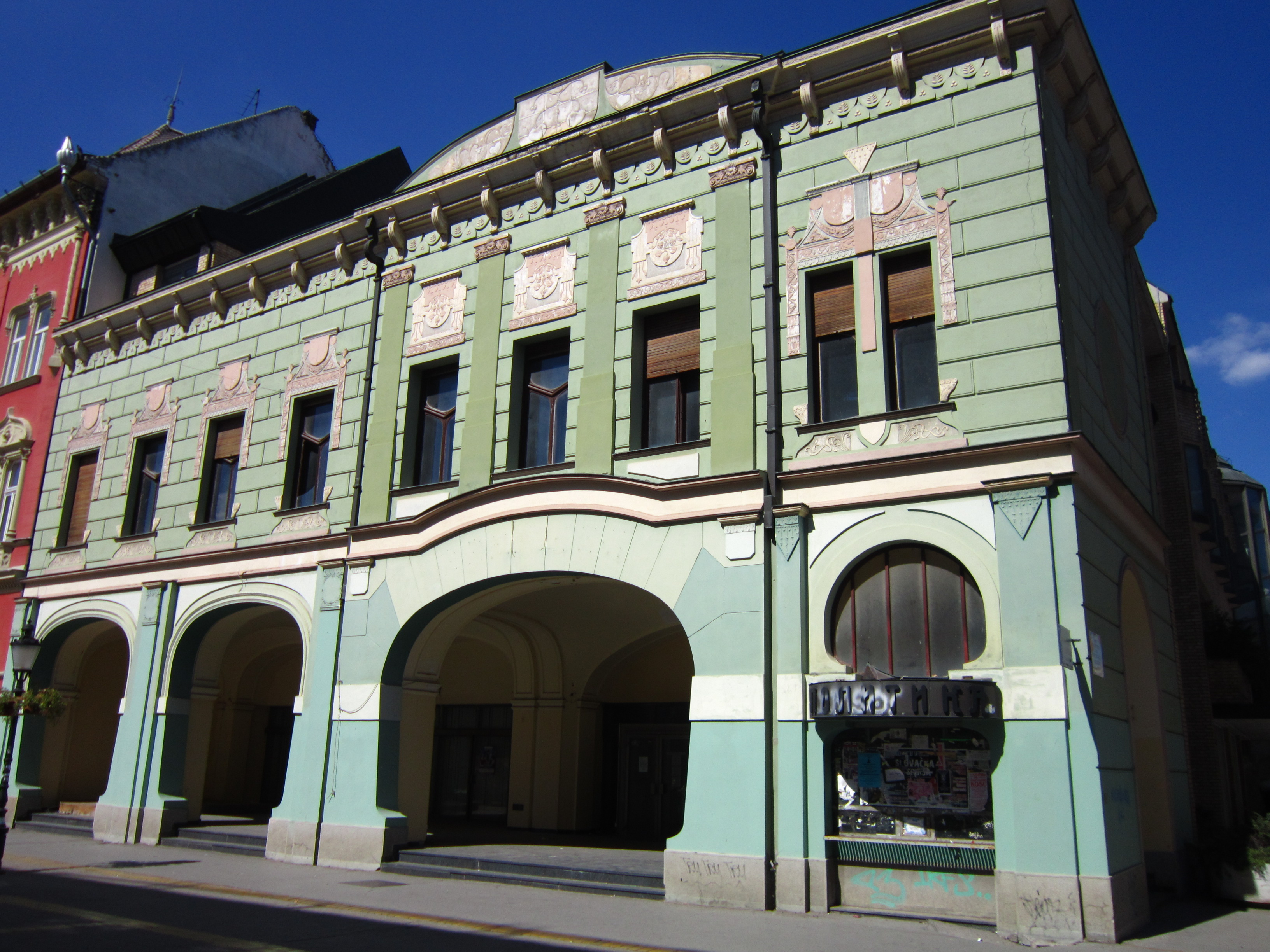 Зграда у Ул. Корзо бр. 3 , Суботица